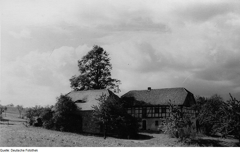 Original image description from the Deutsche Fotothek Kodersdorf-Torga. Ehem. Windmühlengehöft